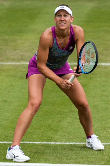 Nicole Melichar